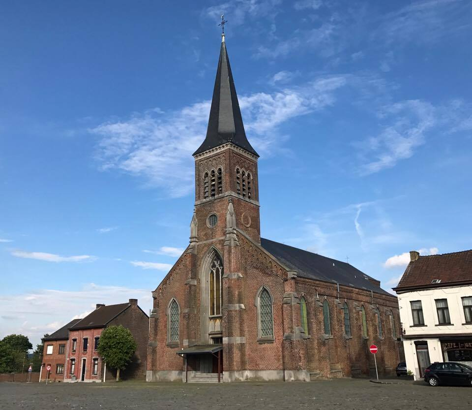 Place de l'Eglise - Souvret